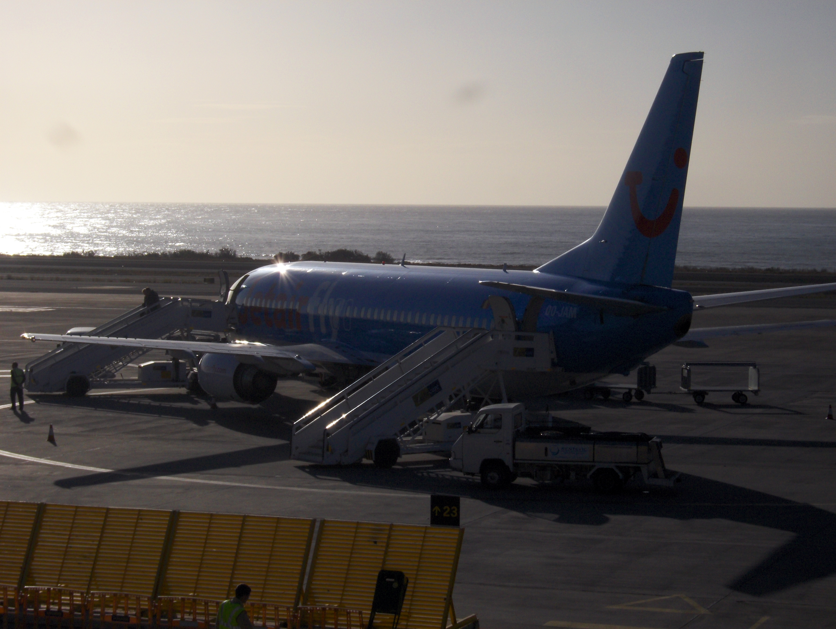 Avión Boeing 737-400 en el aeropuerto de Almería